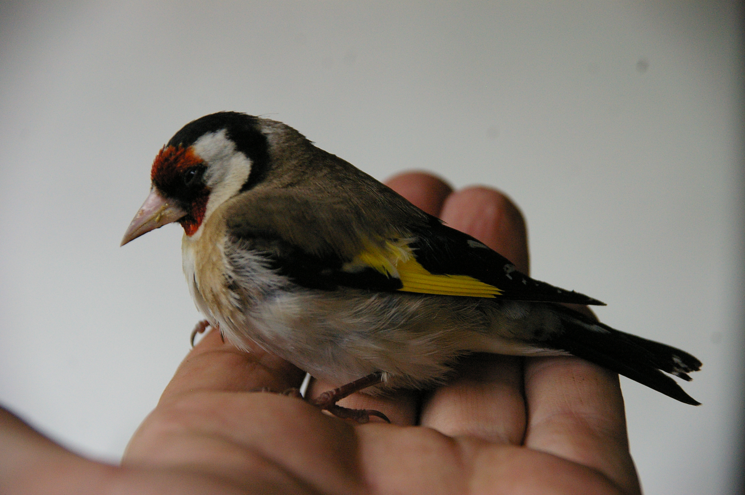 Stieglitz